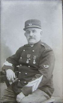 Brigadier forestier - Sergent des chasseurs forestiers vers 1891. À noter les grades administratifs (soutache) portés avec les grades militaires (galons larges), ainsi que le cor argenté sur la manche, récompense de tir. Il est en outre décoré de la Médaille Militaire et de la Médaille d'Honneur des Eaux et Forêts